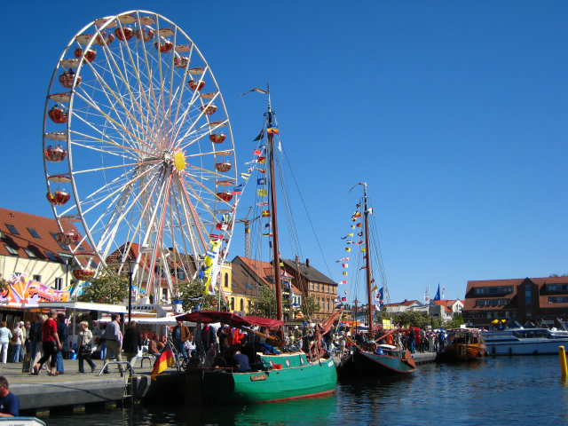 riesenradmueritzsail